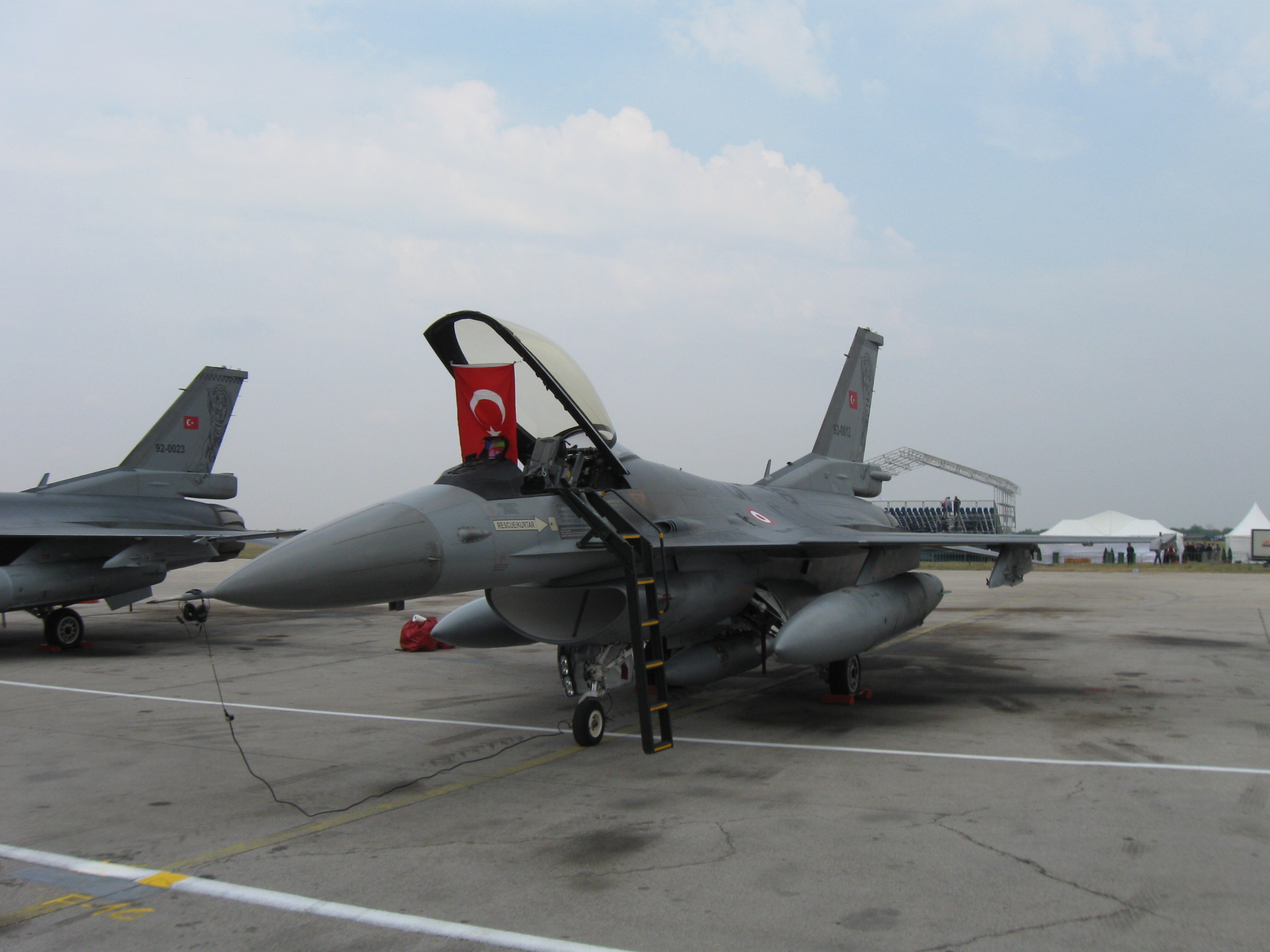 Слика авиона Ф-16. Творац слике је SmirnofLeary и предаје је у јавно власништво. Слика је направена 13. септембра 2009. године на аеромитингу у Батајници.